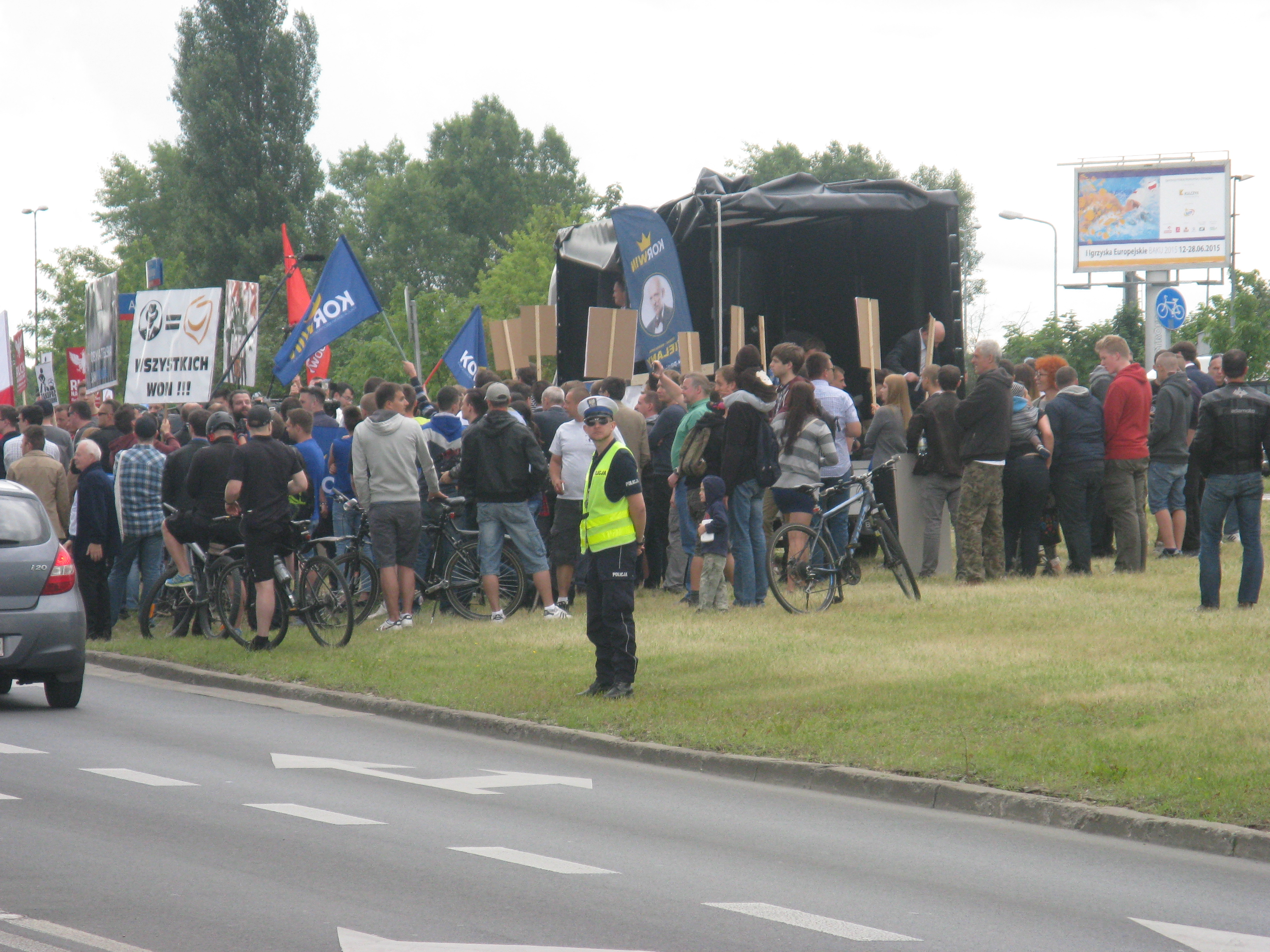 Protesty Partii KORWIN i Ruchu Narodowego przed Areną Ursynów.